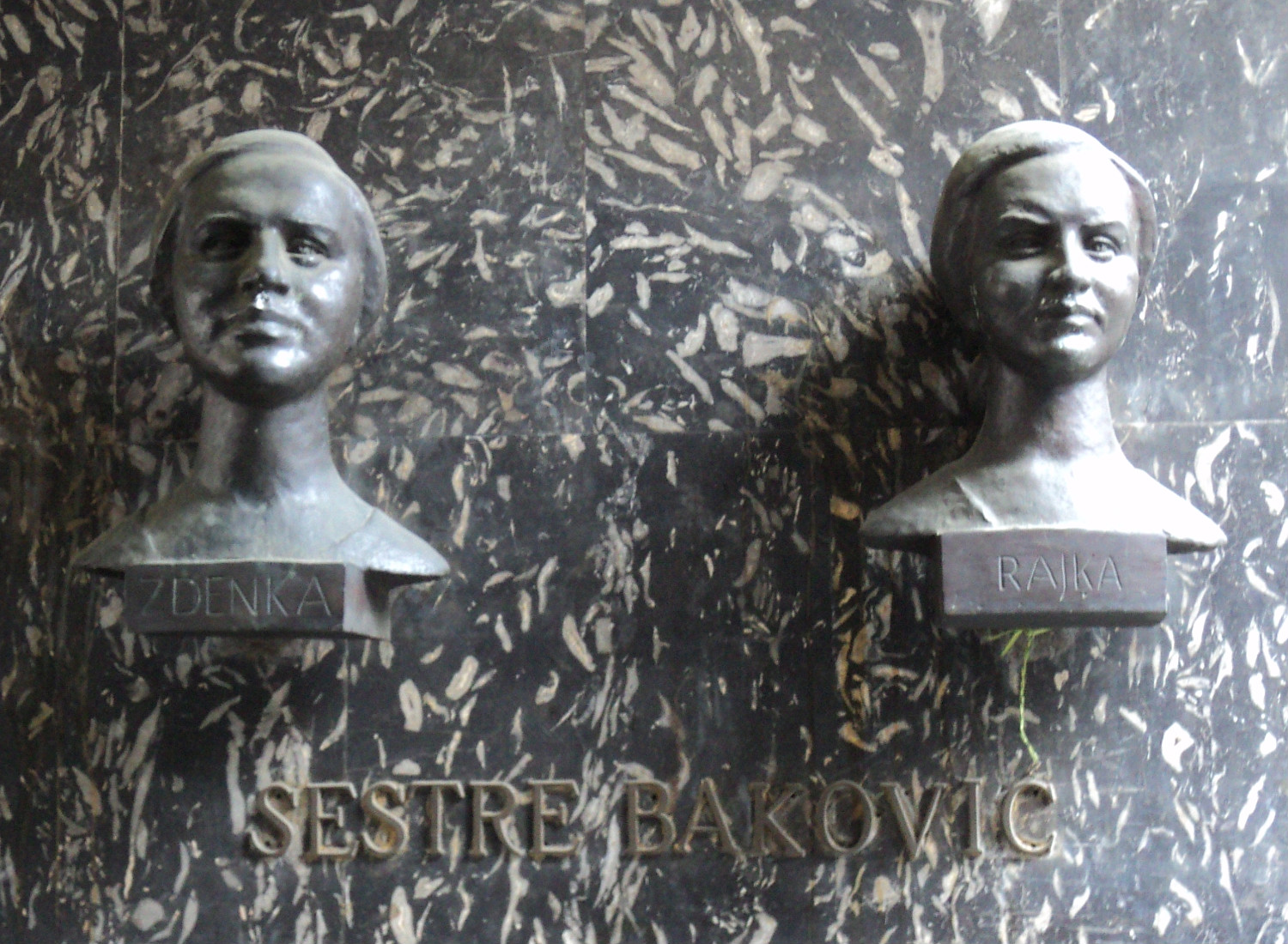 Biste sestara Baković